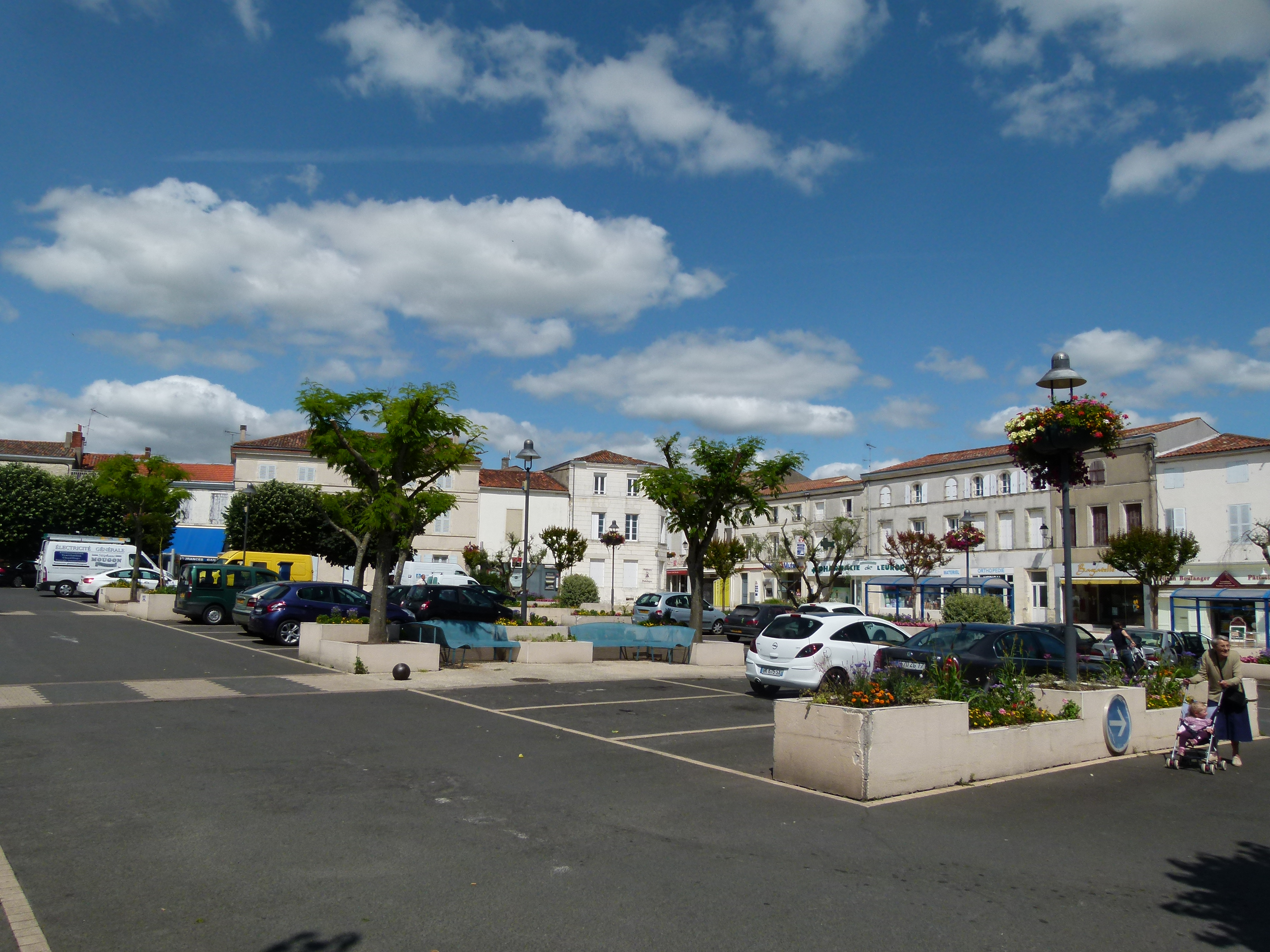 La place de l'Europe une des places modernisées du centre-ville de Surgères.